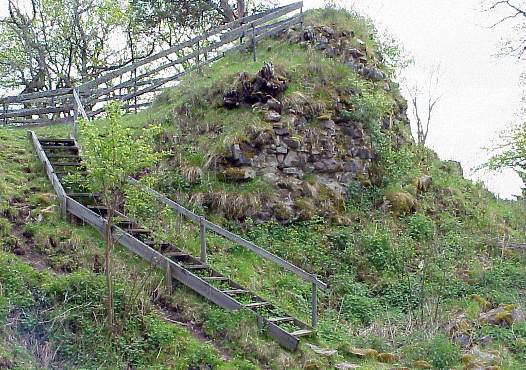 Svaneholms borgruin, Östergötland